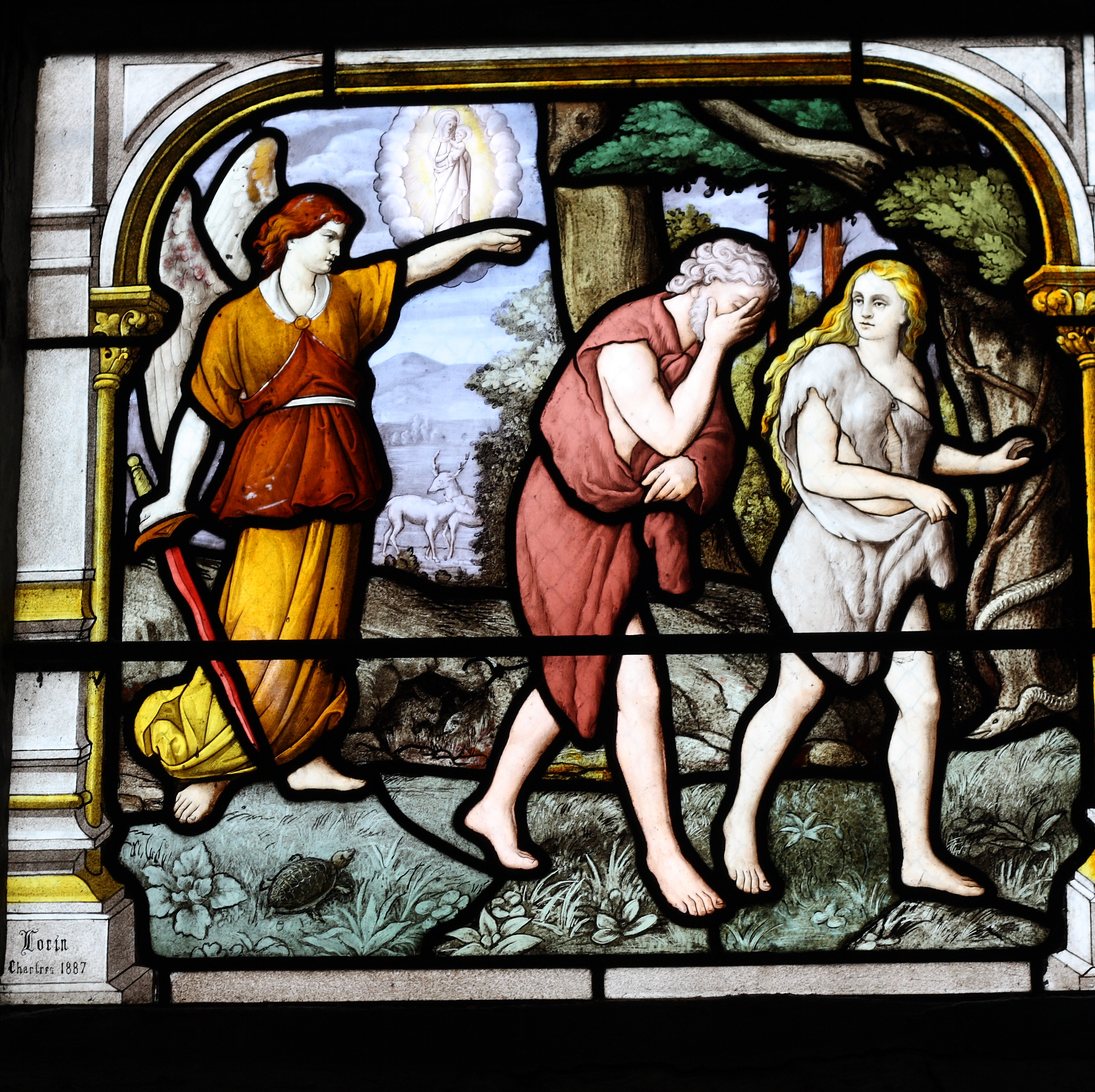 Bleiglasfenster (Ausschnitt) in der katholischen Pfarrkirche Église Saint-Aignan de Chartres in Chartres, Darstellung: Verteibung aus dem Paradies, Signatur: "Lorin Chartres 1887"